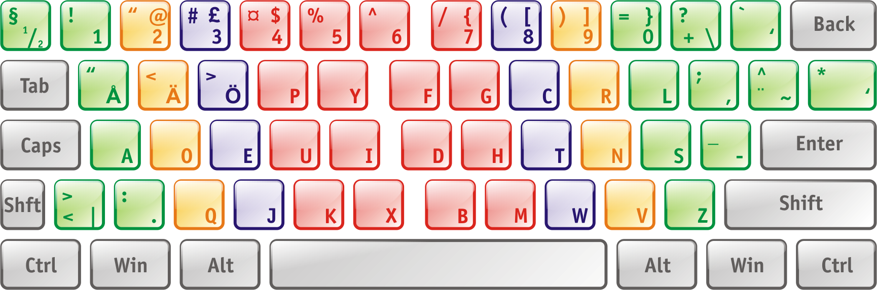 Dvorak Layout - Svorak